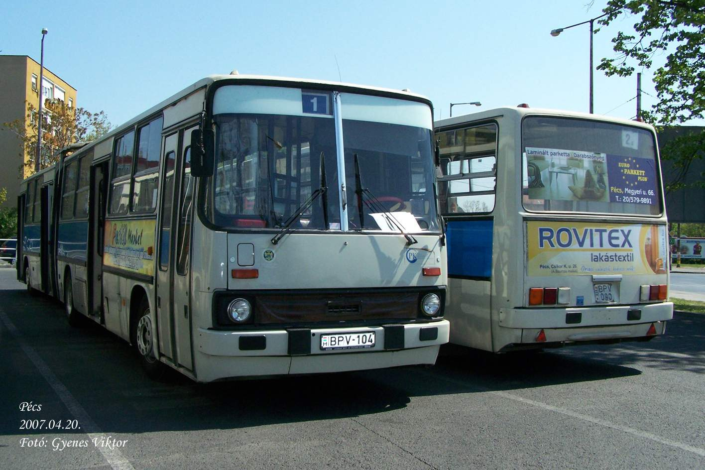 Ikarus 280-as Pécsett az 1-es vonalon